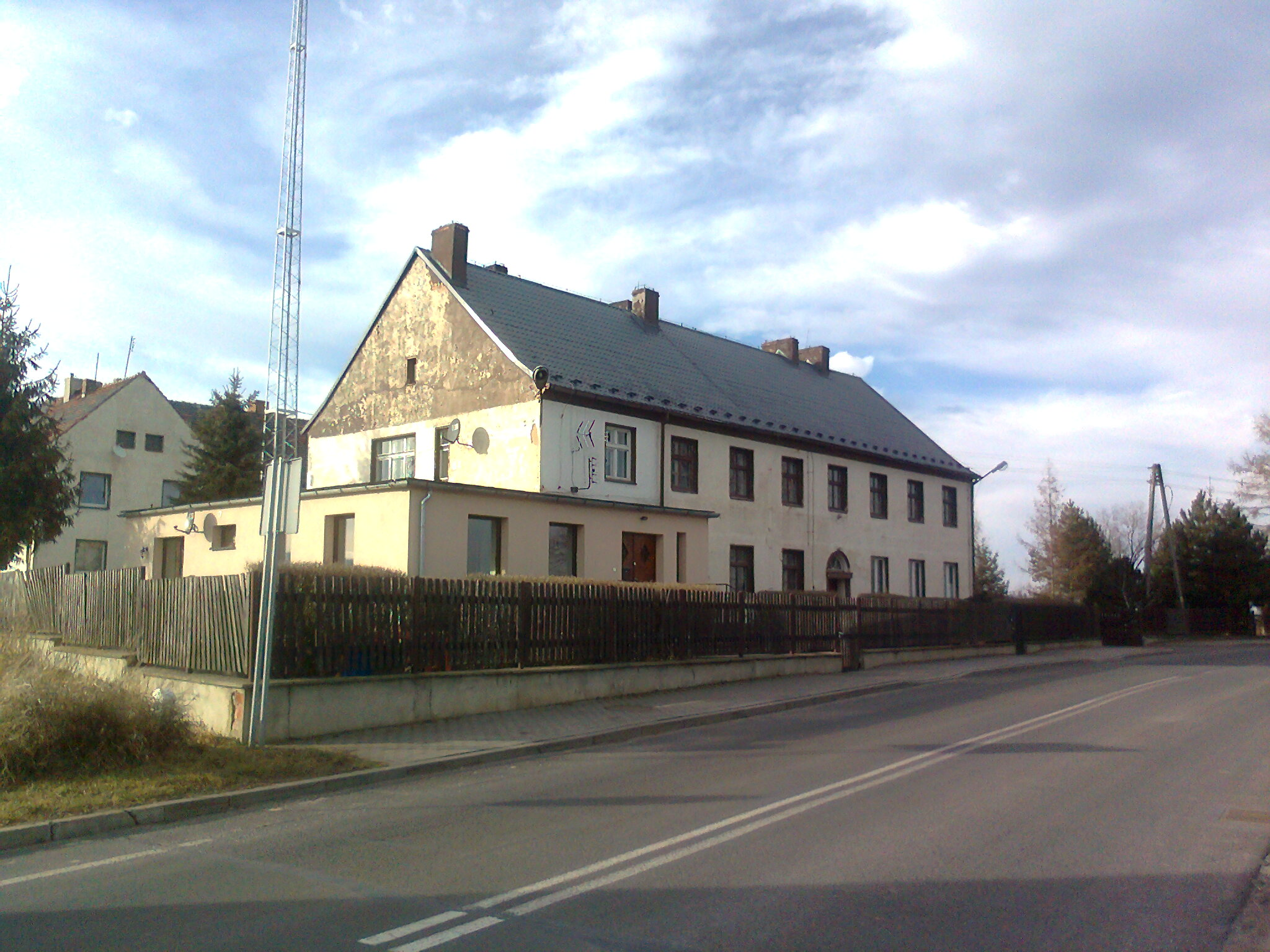 Budynek mieszkalny wcześniej: Strażnica WOP Konradów, Placówka Straży Granicznej w Głuchołazach z miejscem dyslokacji w Konradowie, Placówka Straży Granicznej w Nysie (z siedzibą tymczasową w Konradowie).